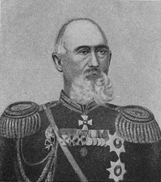 Генерал от инфантерии бар. А. Е. Врангель